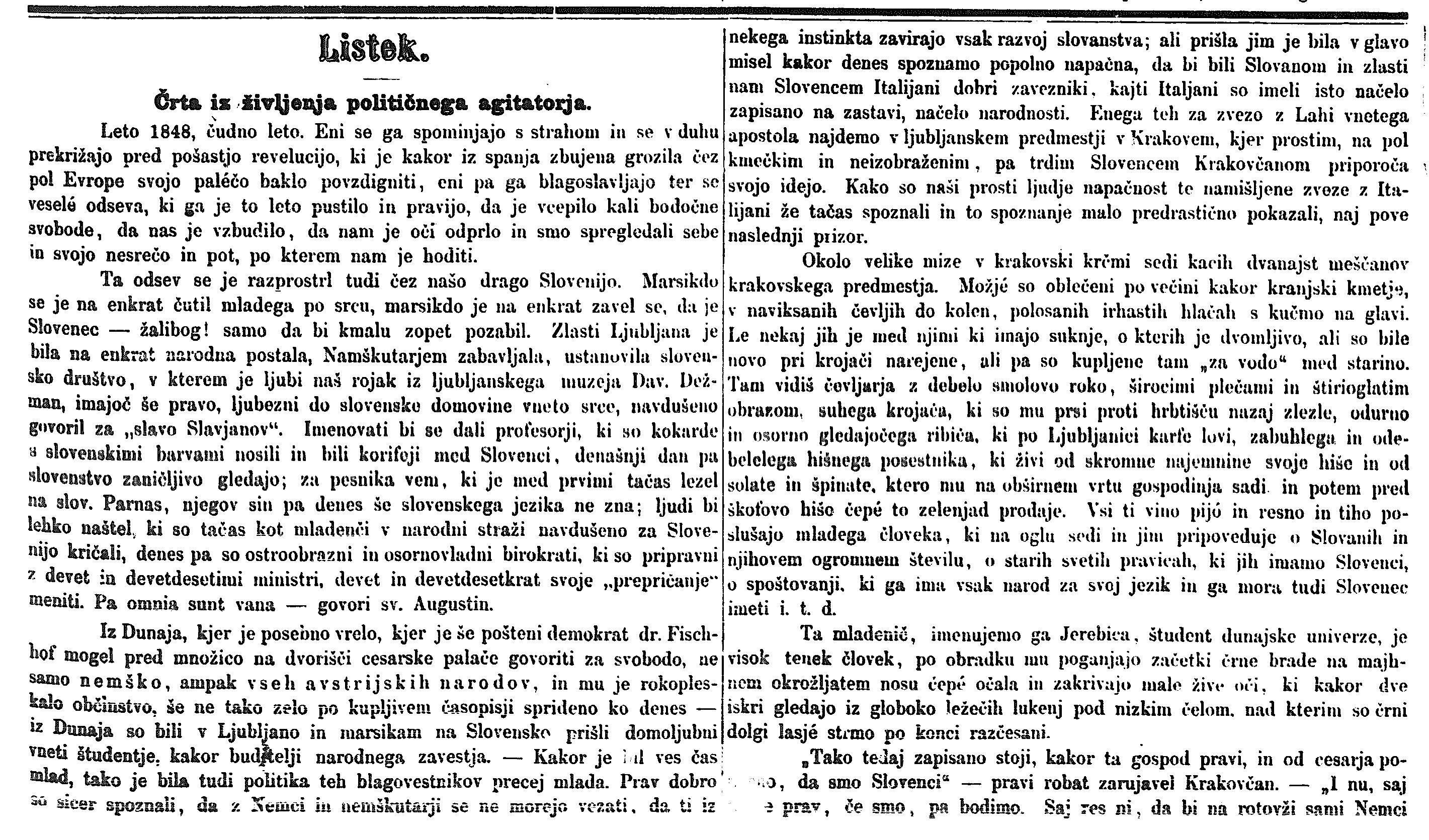 Skeniran izsek iz časopisa Slovenski narod iz NUK-a. Besedilo predstavlja prvi del krajšega proznega besedila Črta iz življenja političnega agitatorja Josipa Jurčiča iz leta 1868. Skeniran del je bil objavljen 8. avgusta. Zaradi starosti so ji avtorske pravice potekle.